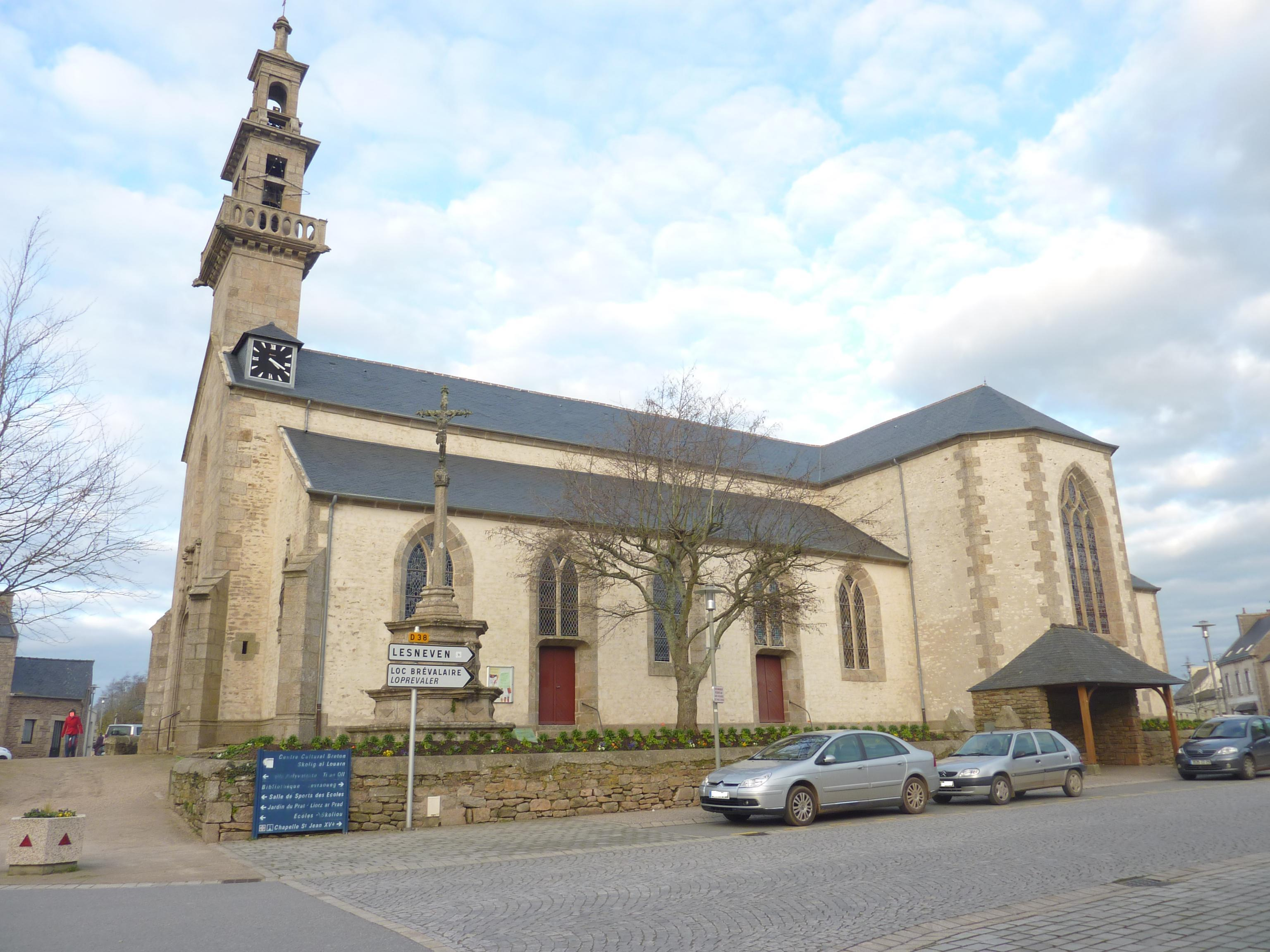 Plouvien : l'église paroissiale Saint-Pierre-et-Saint-Paul : vue d'ensemble